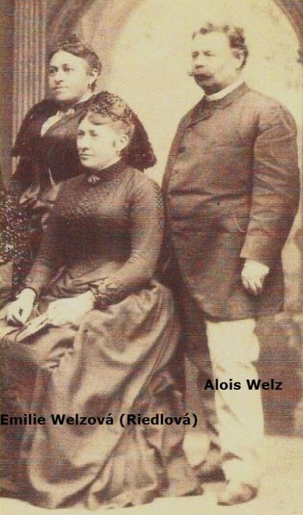 Alois Welz (1821 - 1895), Rakouský a český velkostatkář, podnikatel a politik s maželkou Emílií.